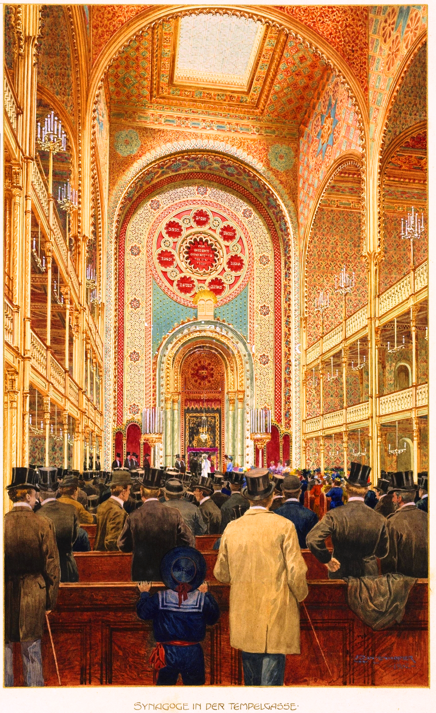 Emil_Ranzenhofer_(1864-1930),_Inneres der Synagoge_in_der_Tempelgasse,_Wien.PNG